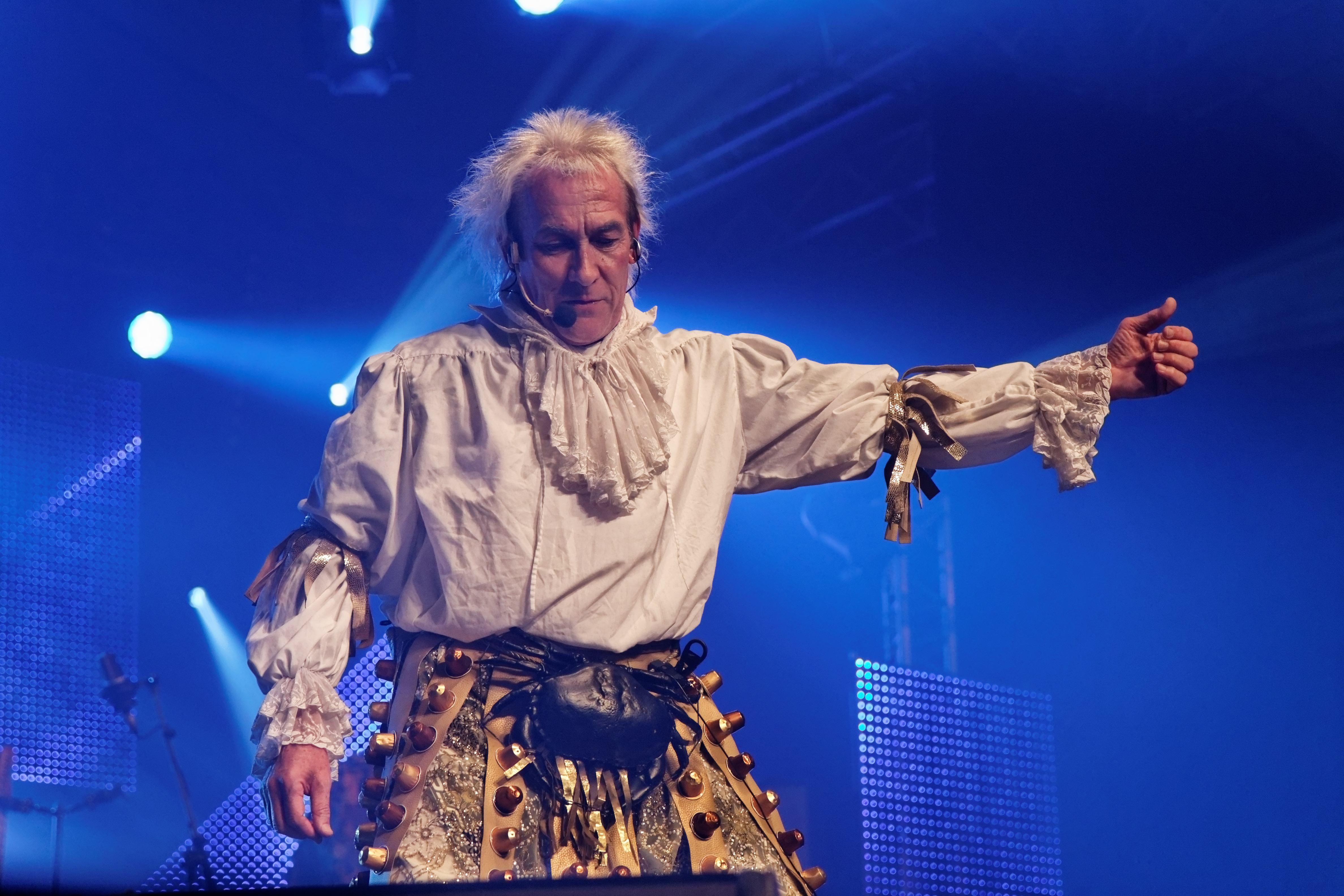 Tri Yann en concert à l'espace Gradlon lors du festival de Cornouaille 2012.